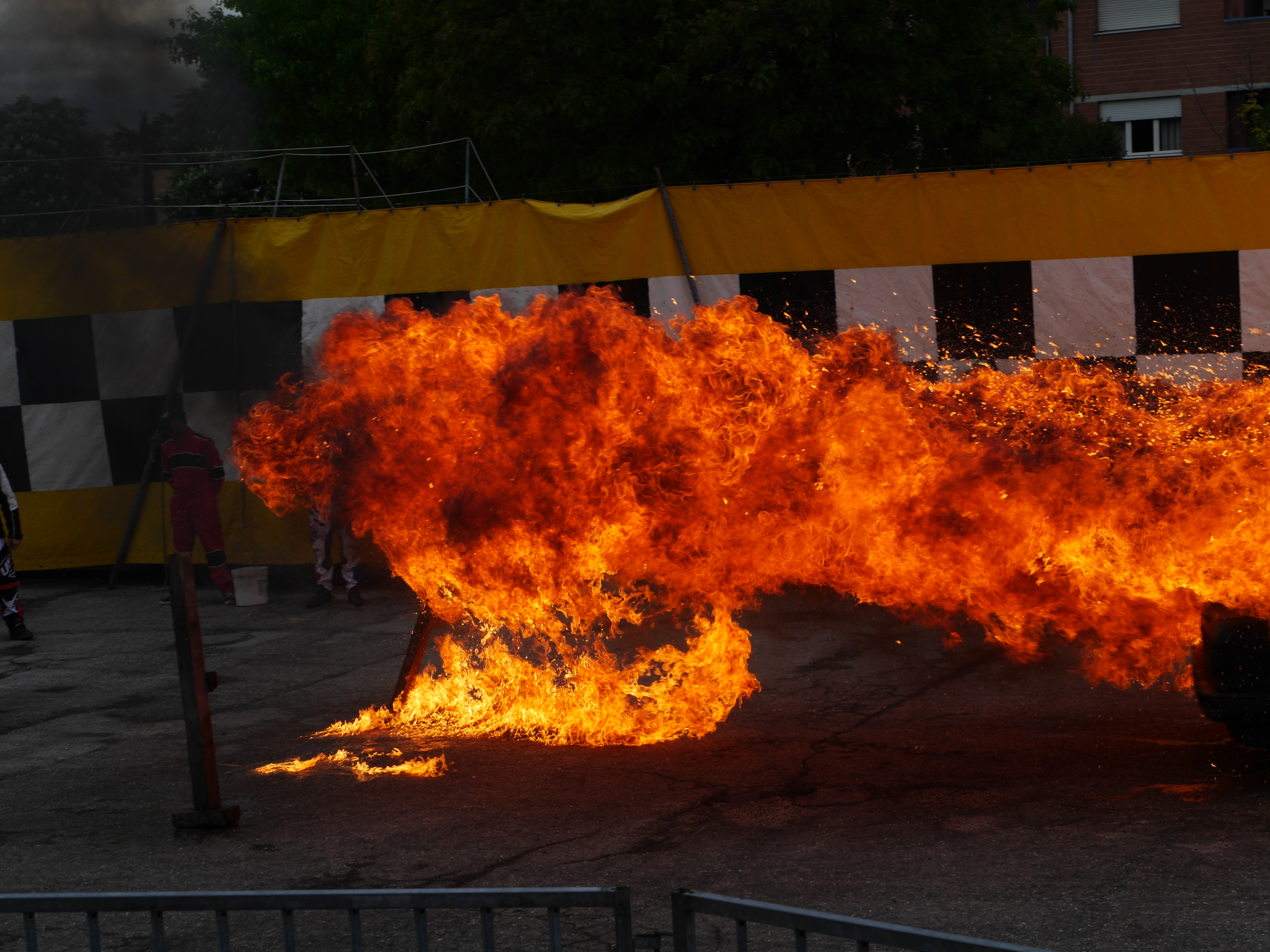 This photo was taken with Panasonic Lumix DMC-GH3 camera, thanks to Panasonic. You can see all photographs in category: Taken with Panasonic Lumix DMC-GH3.